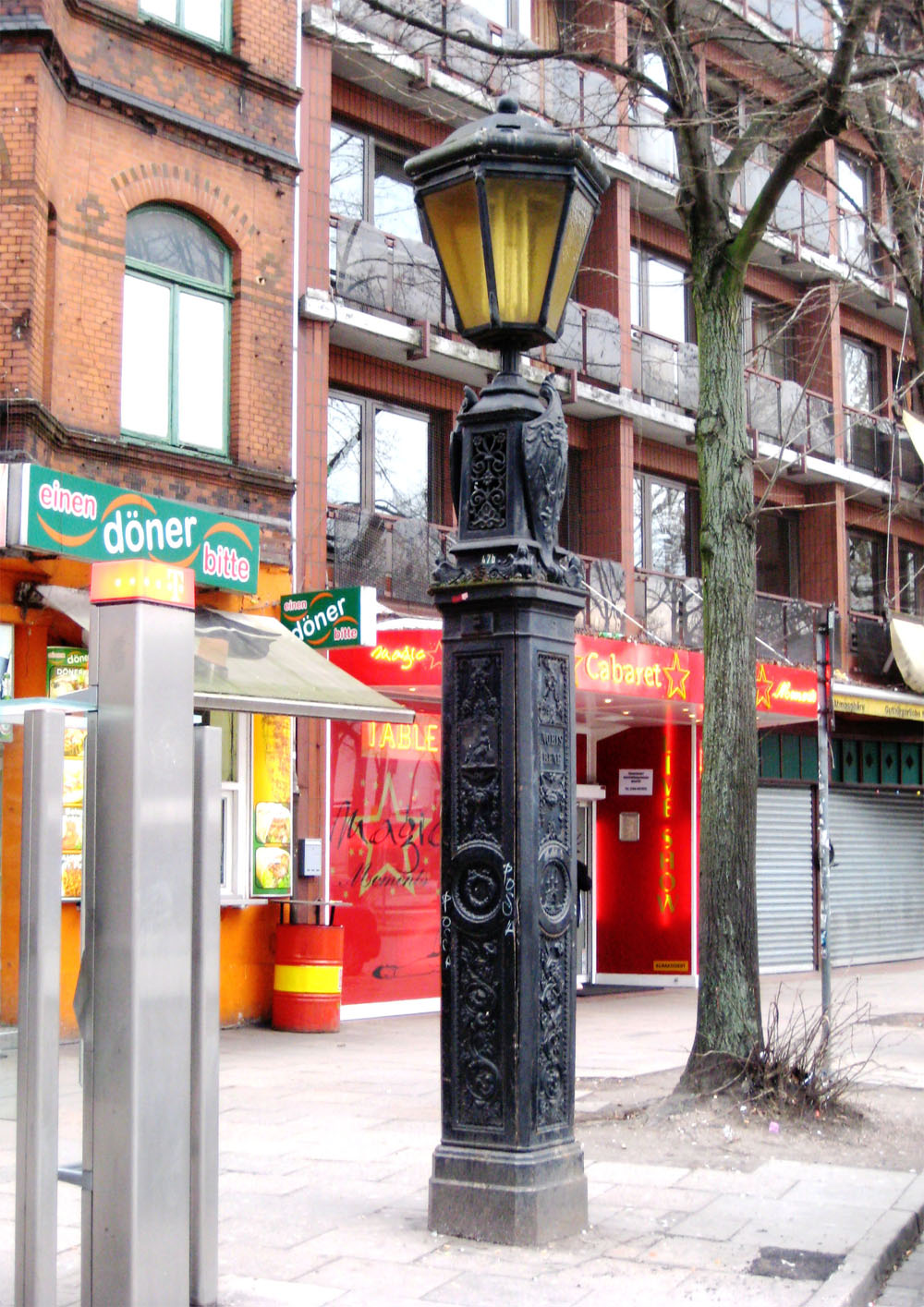 Torpfeiler vom ehemaligen Nobistor / Stadttor in Hamburg-Altona/Reeperbahn 170This is a photograph of an architectural monument.